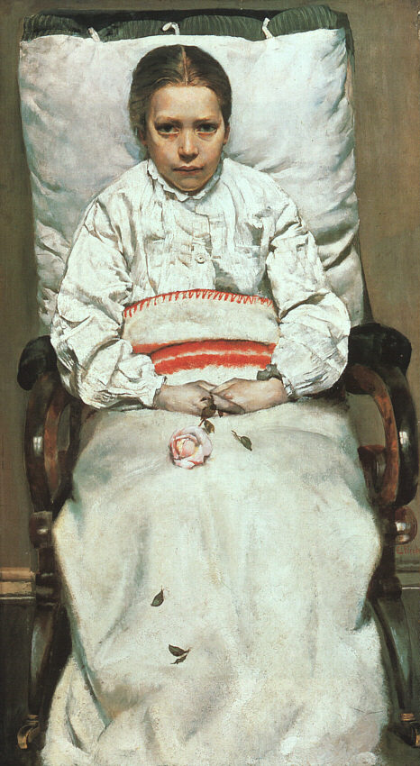 Sick girl